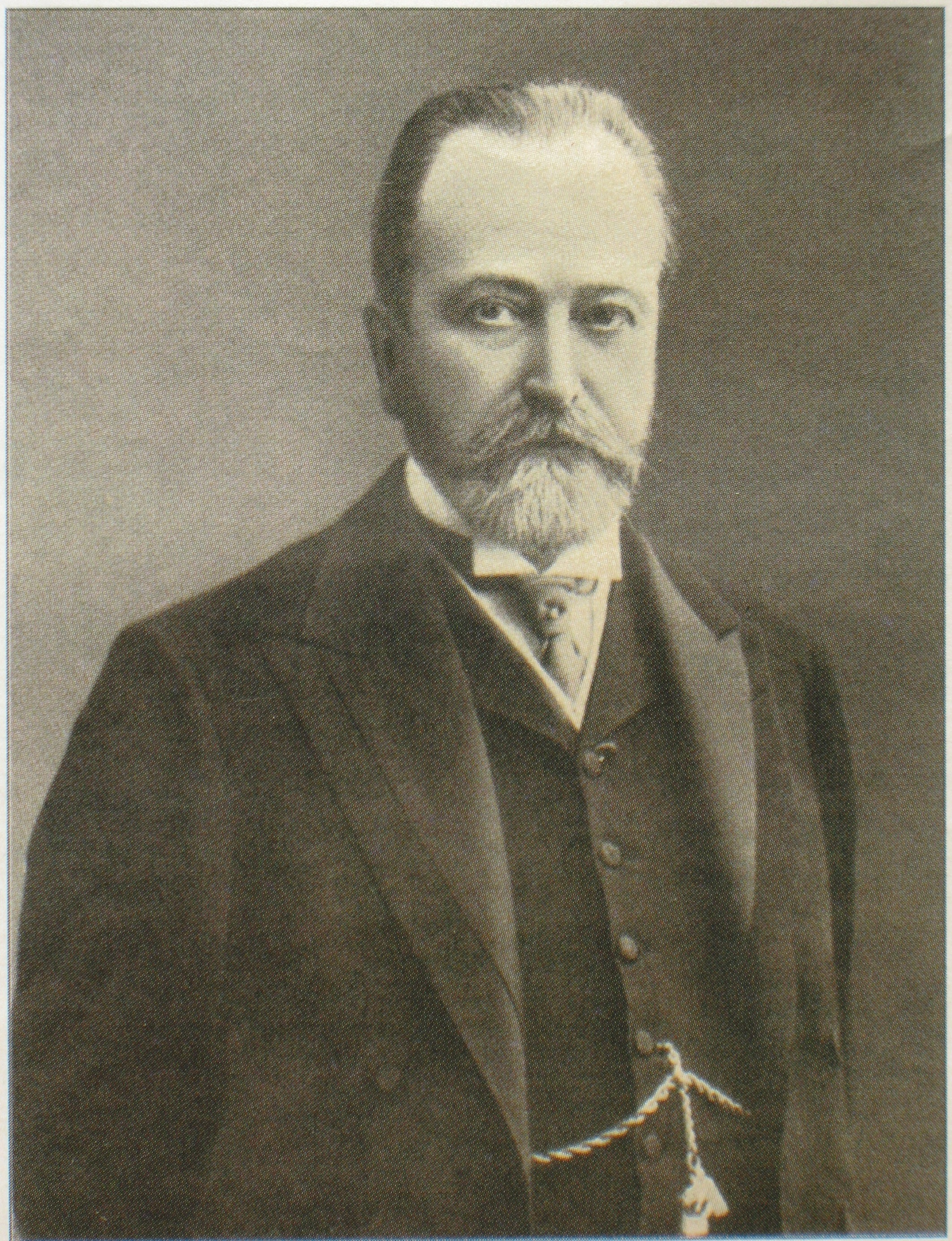 Министр финансов Российской империи Владимир Николаевич Коковцов (1853-1943).